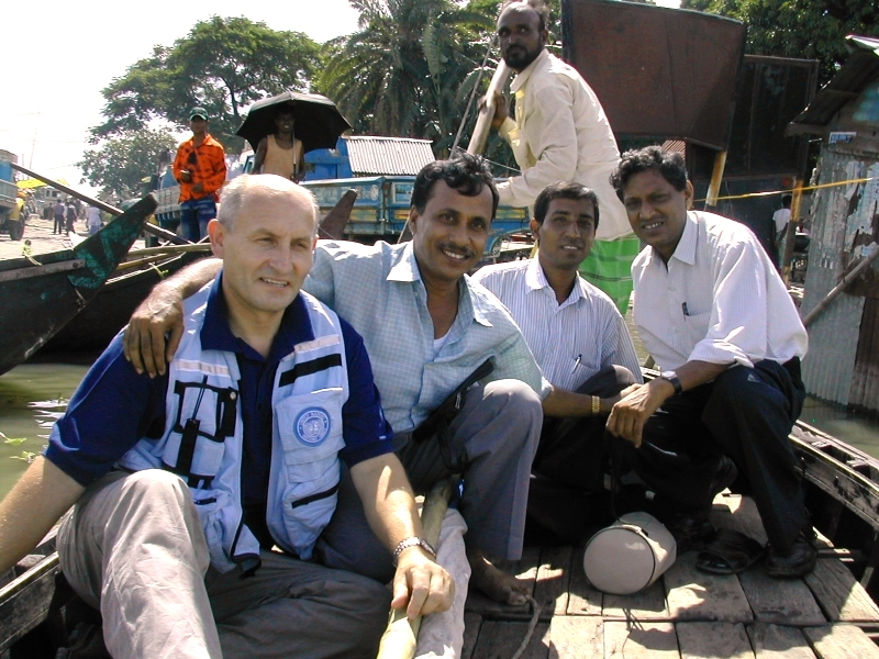 Einsatz in Bangladesh 2004